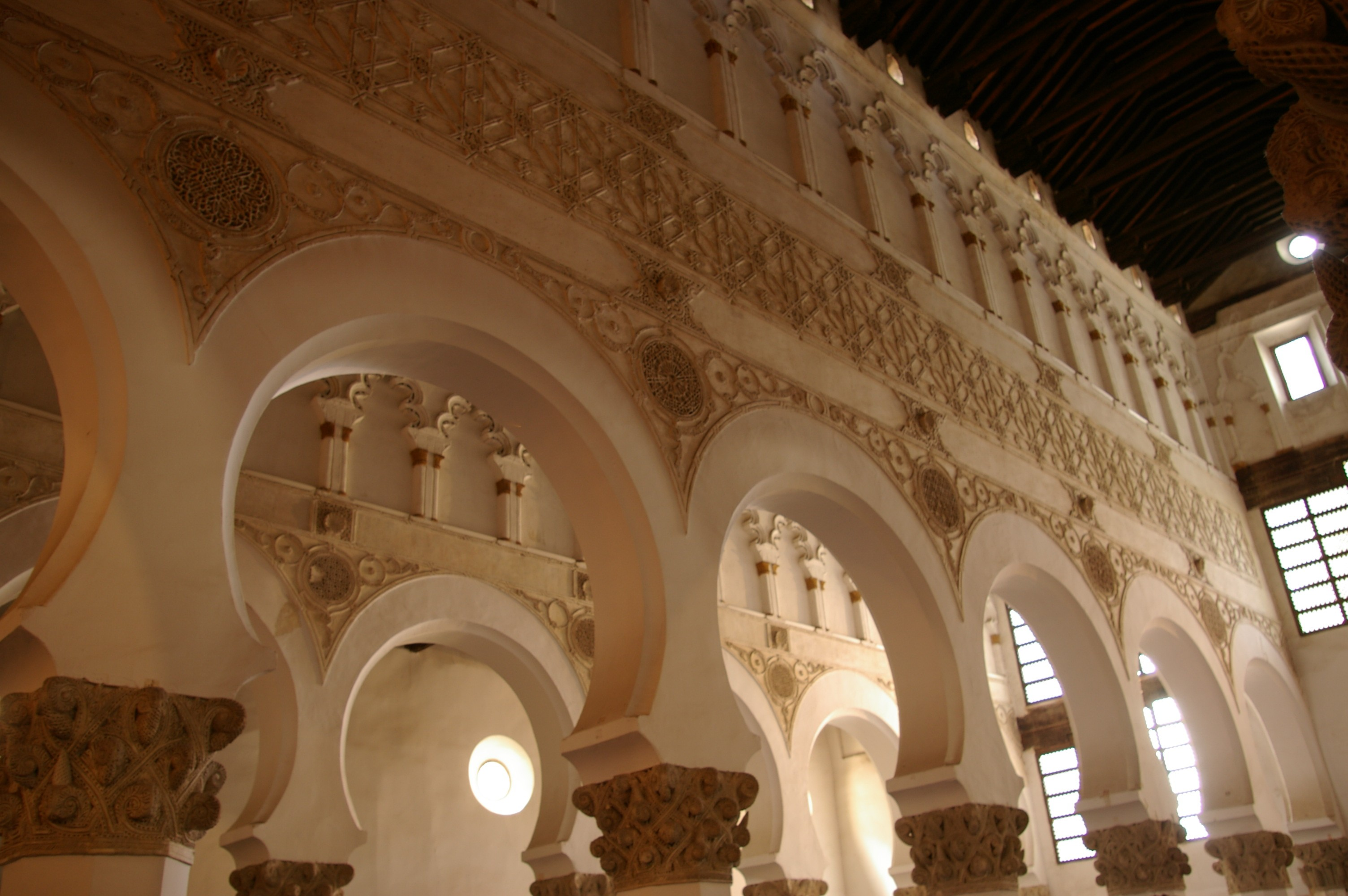 Synagogue Santa Maria la Blanca